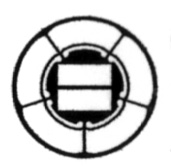 櫛淵家家紋、五つ瓜に二木